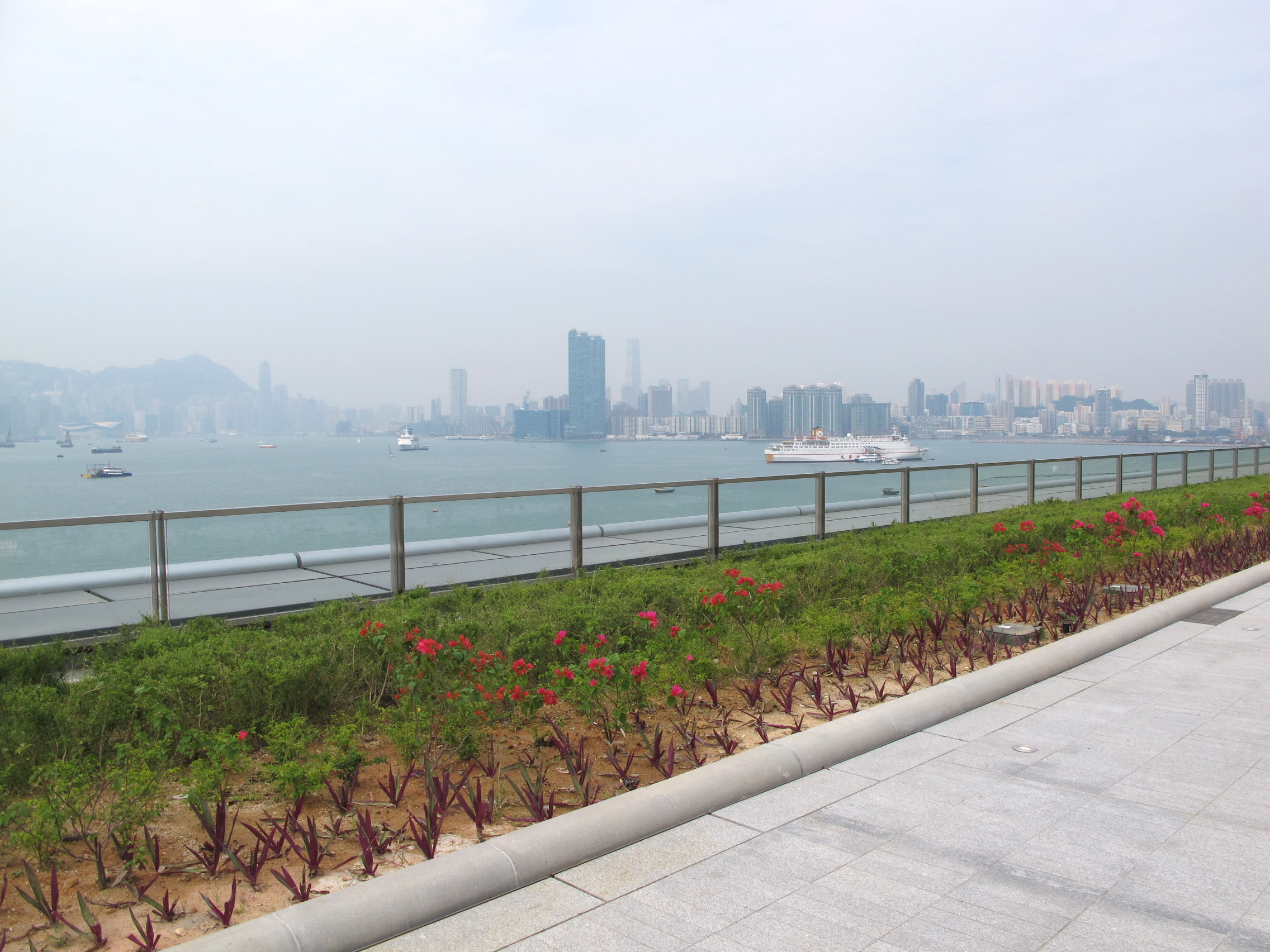 Kai Tak Cruise Terminal Park Viewing Deck